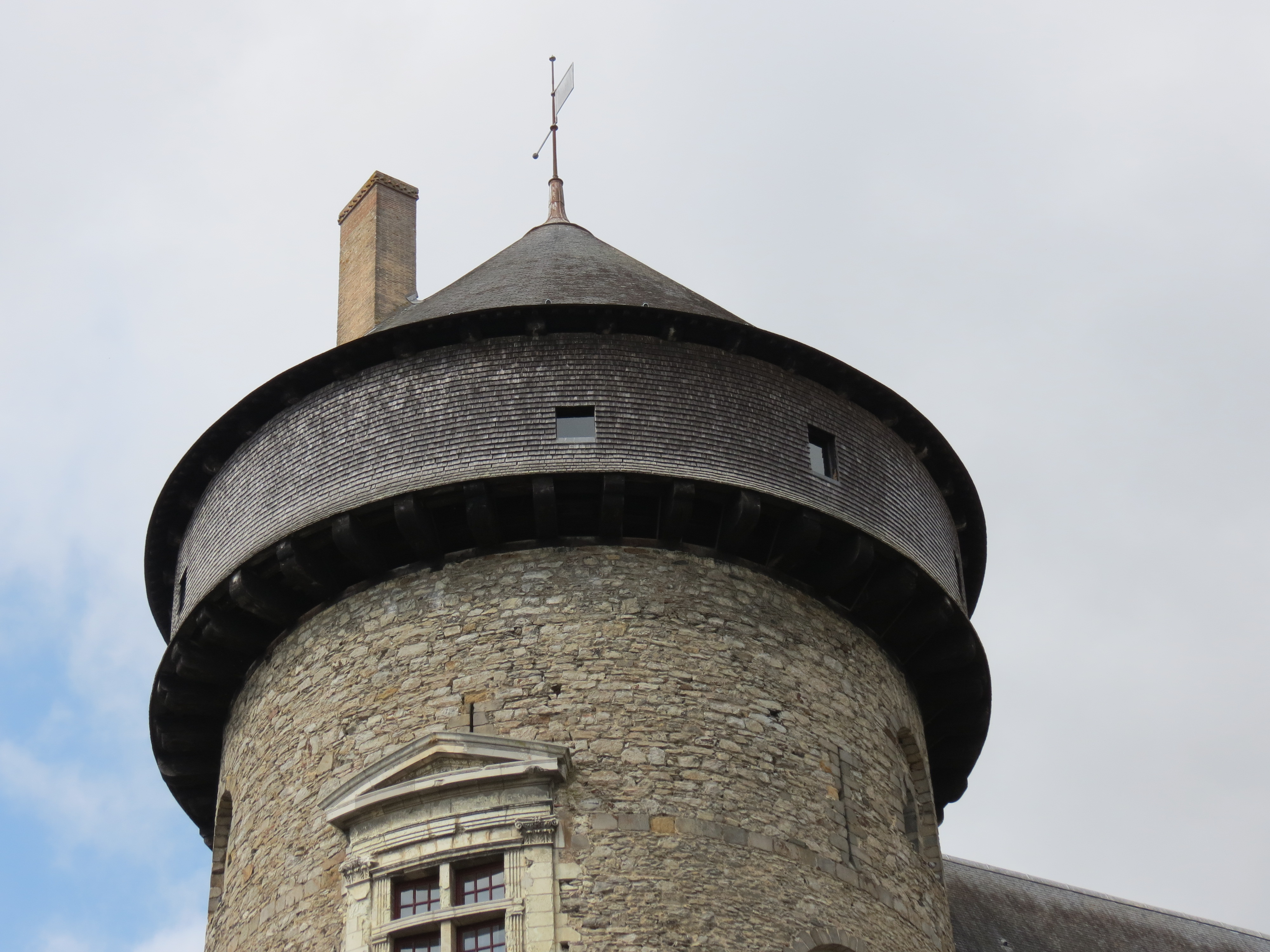 Château, Laval, Mayenne, Pays de la Loire.